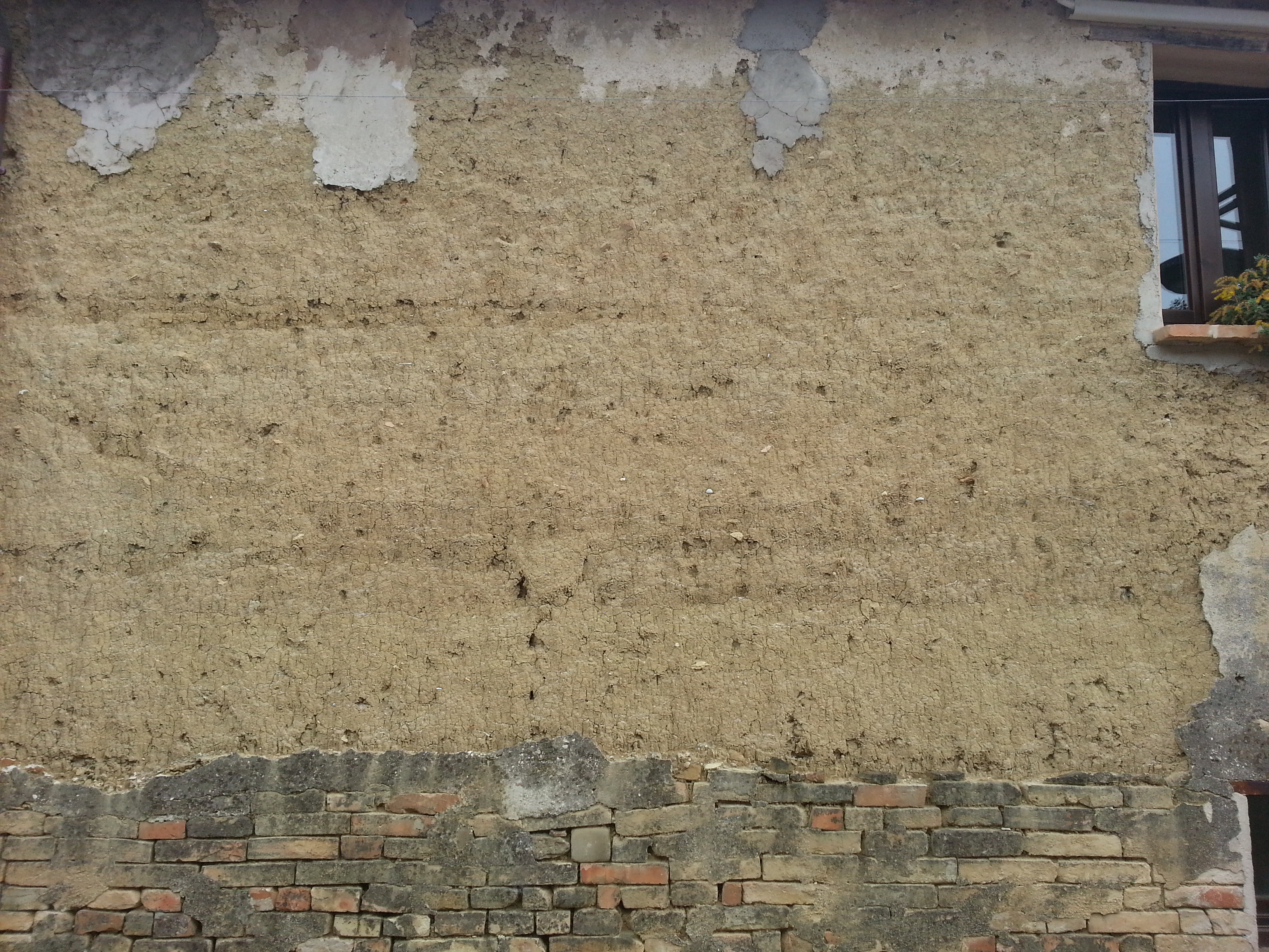 Stratigrafia Muraria Villa Ficana utile ad identificare i vari strati della tecnica costruttiva dell'unità muraria